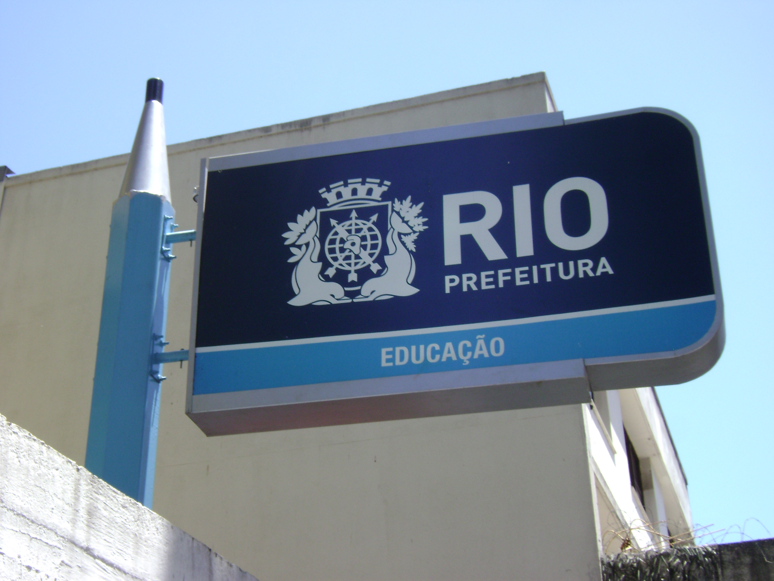 Placa indicativa de escola pública na cidade do Rio de Janeiro, Brasil.